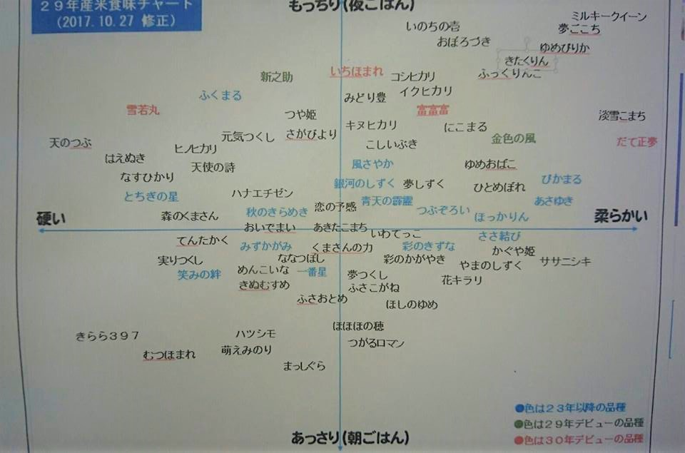 29年産米食味チャート